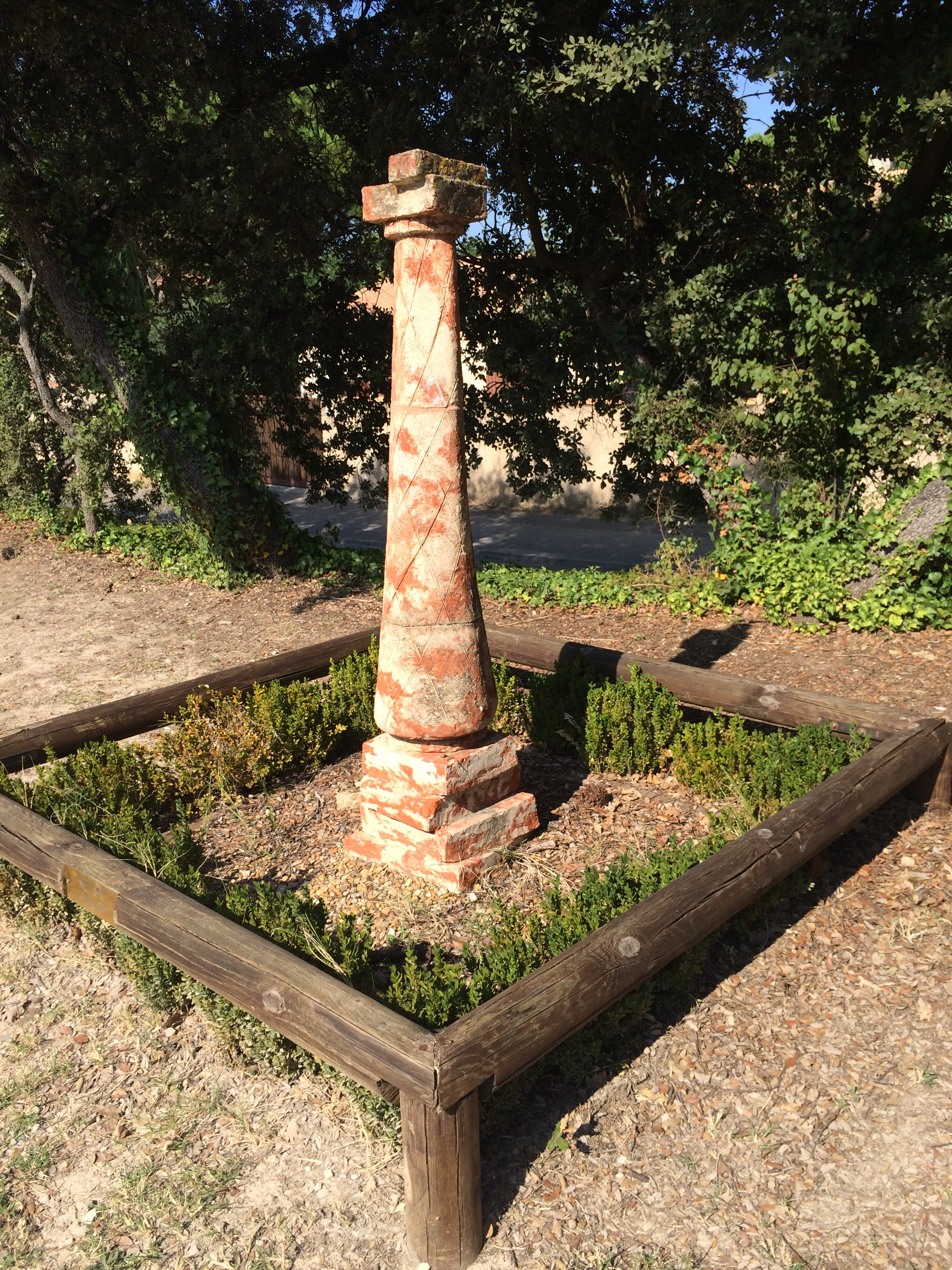 Transformation einer Balustrade. Geschenk an die Ortschaft Taillades, Provence, 2005